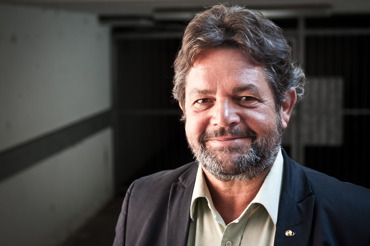 Reinhold Pix Portait Polkowski